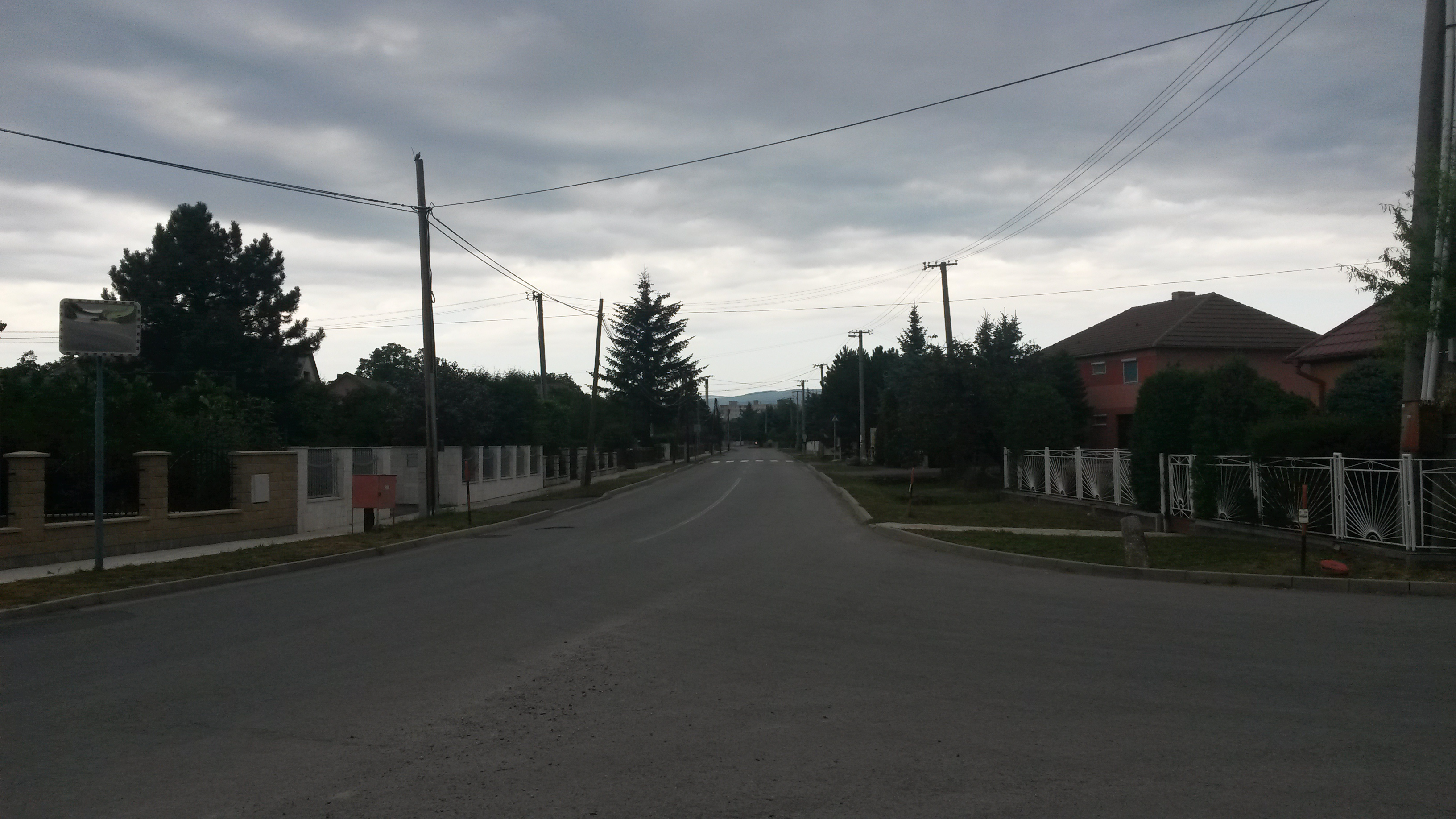 Komárovce